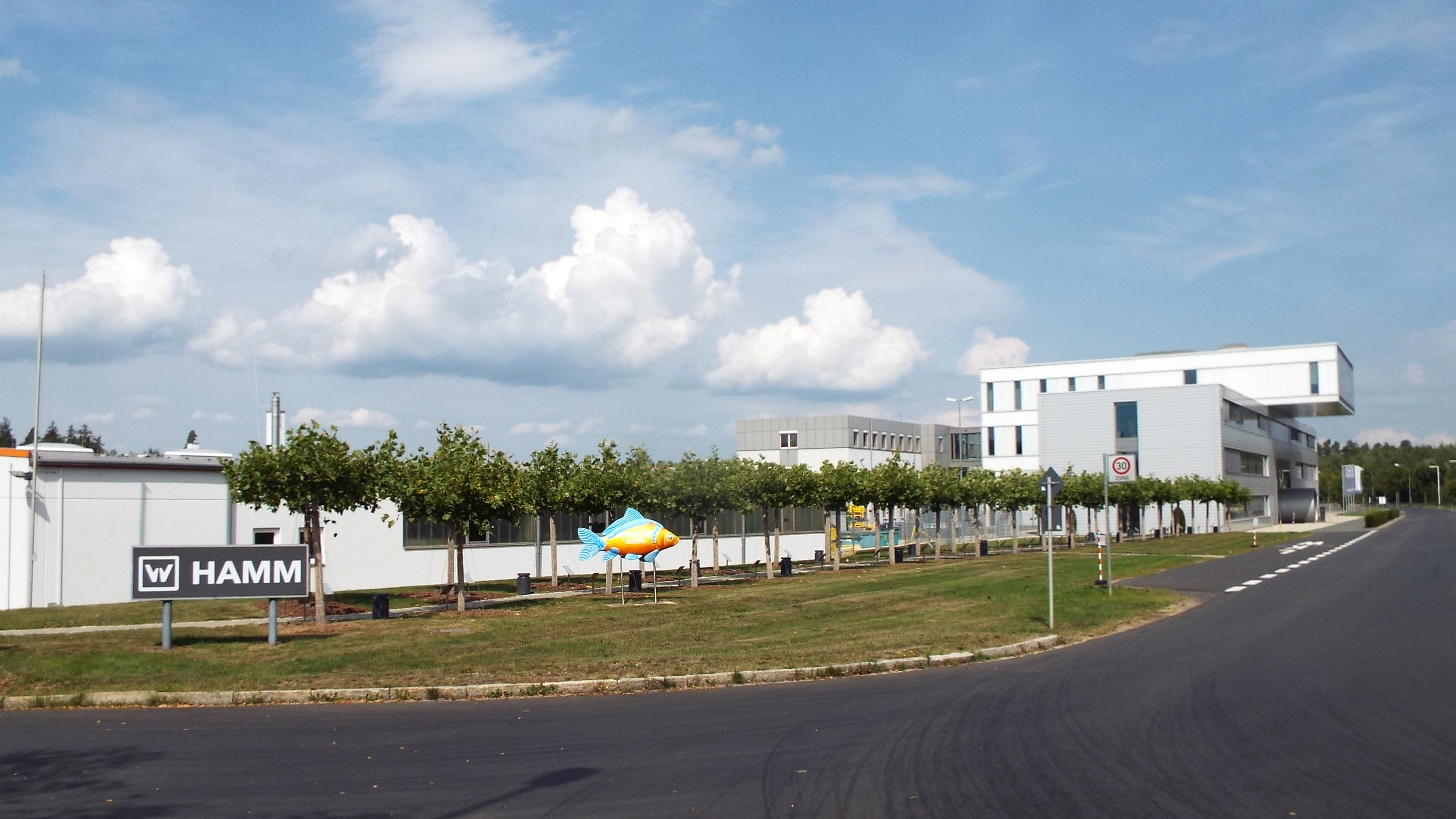 Die Hamm AG ist ein Hersteller von Walzen für verschiedene Einsatzgebiete des Straßen- und Flughafen-, Damm- und Erdbaus. Das Lihtbild zeigt das Werk mit Verwaltungsgebäude